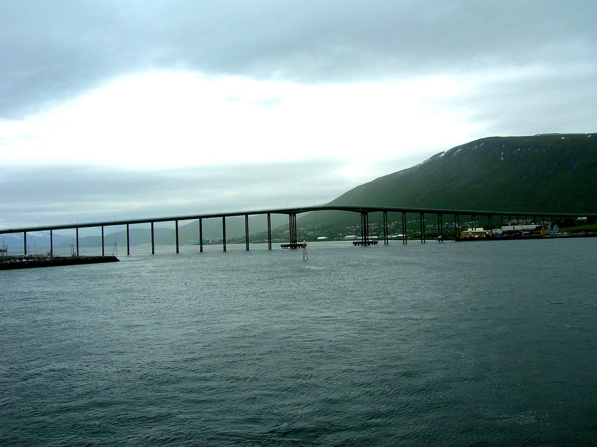 Tromso, déi gouss Bréck